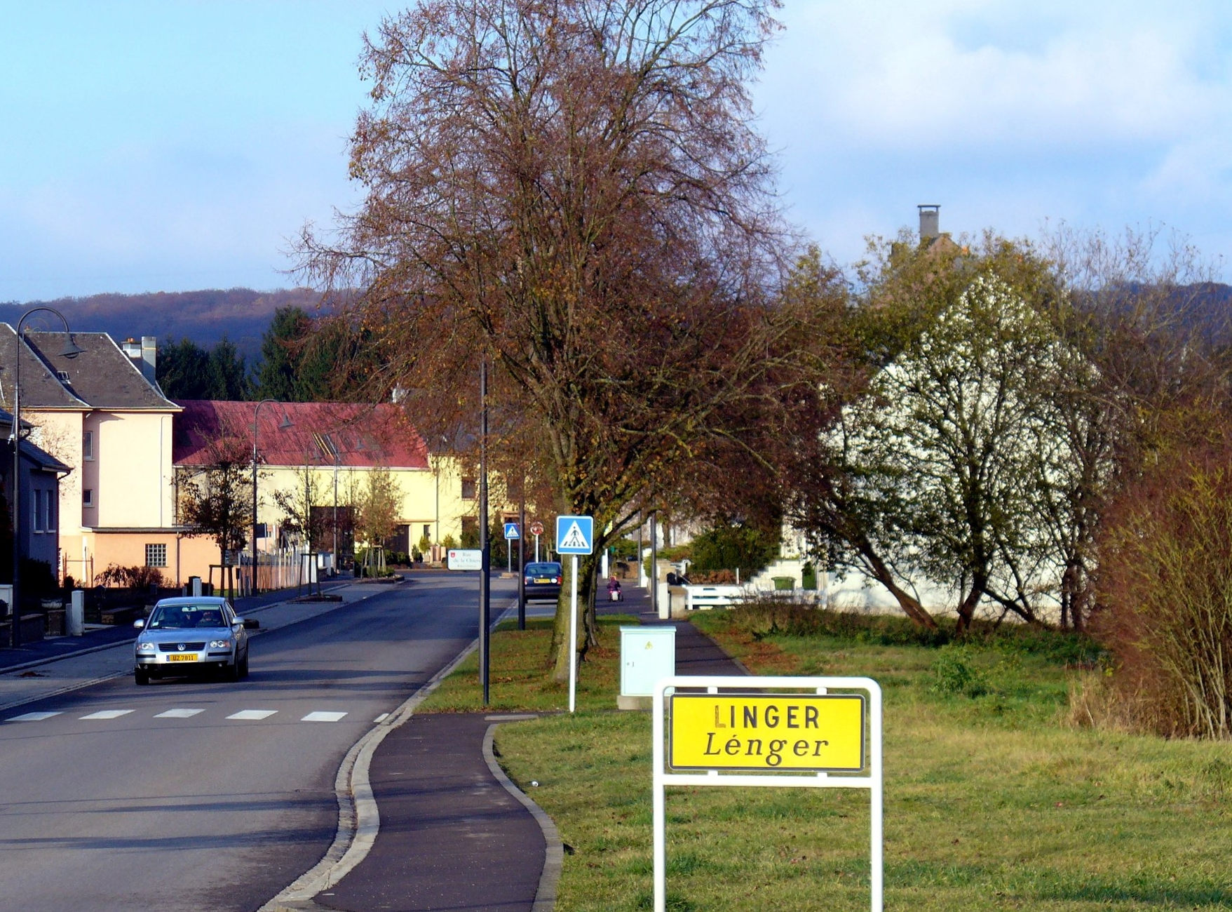 Lénger